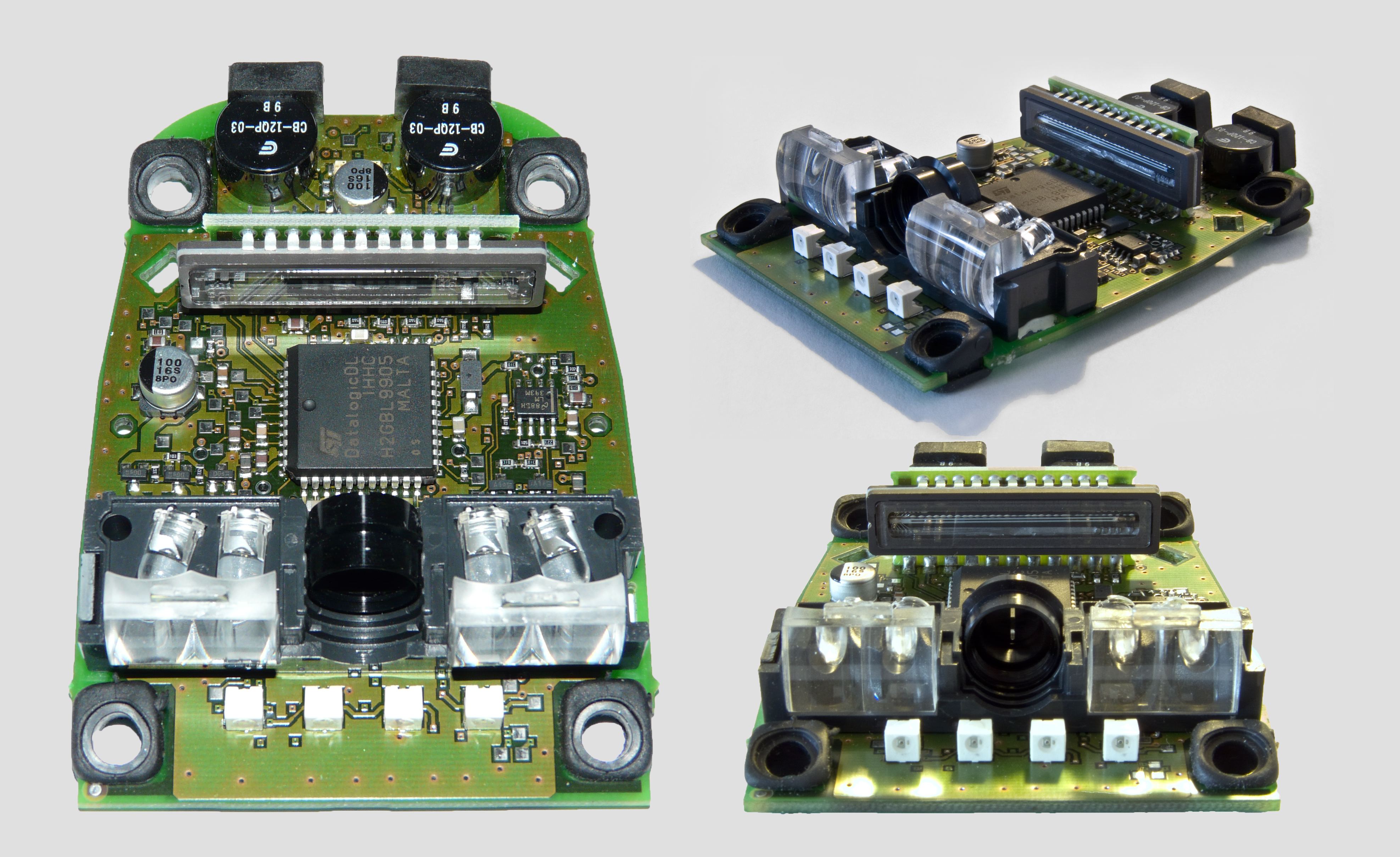 Platine eines CCD Barcode Scanners aus verschiedenen Blickwinkel. Hersteller: Datalogic. Genauer Typ unbekannt.